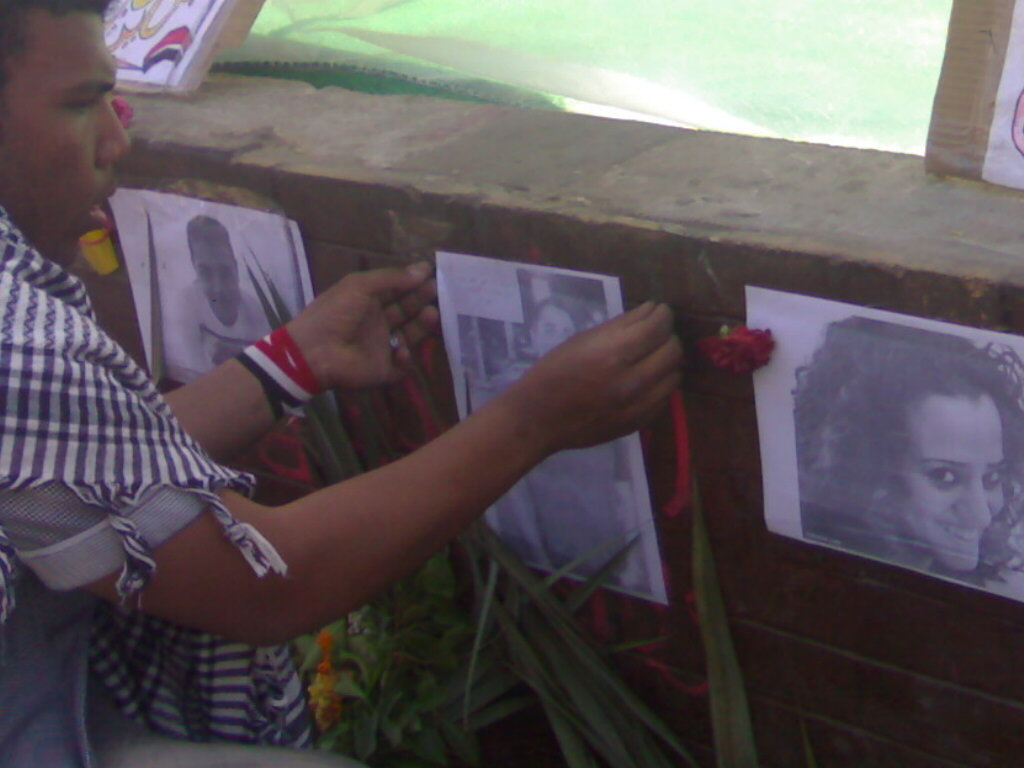 شاب يقوم بوضع صور ضحايا ثورة 25 يناير حول دارة ميدان التحرير بالقاهرة يوم الجمعة 4 مارس 2011 (جمعة التطهير).